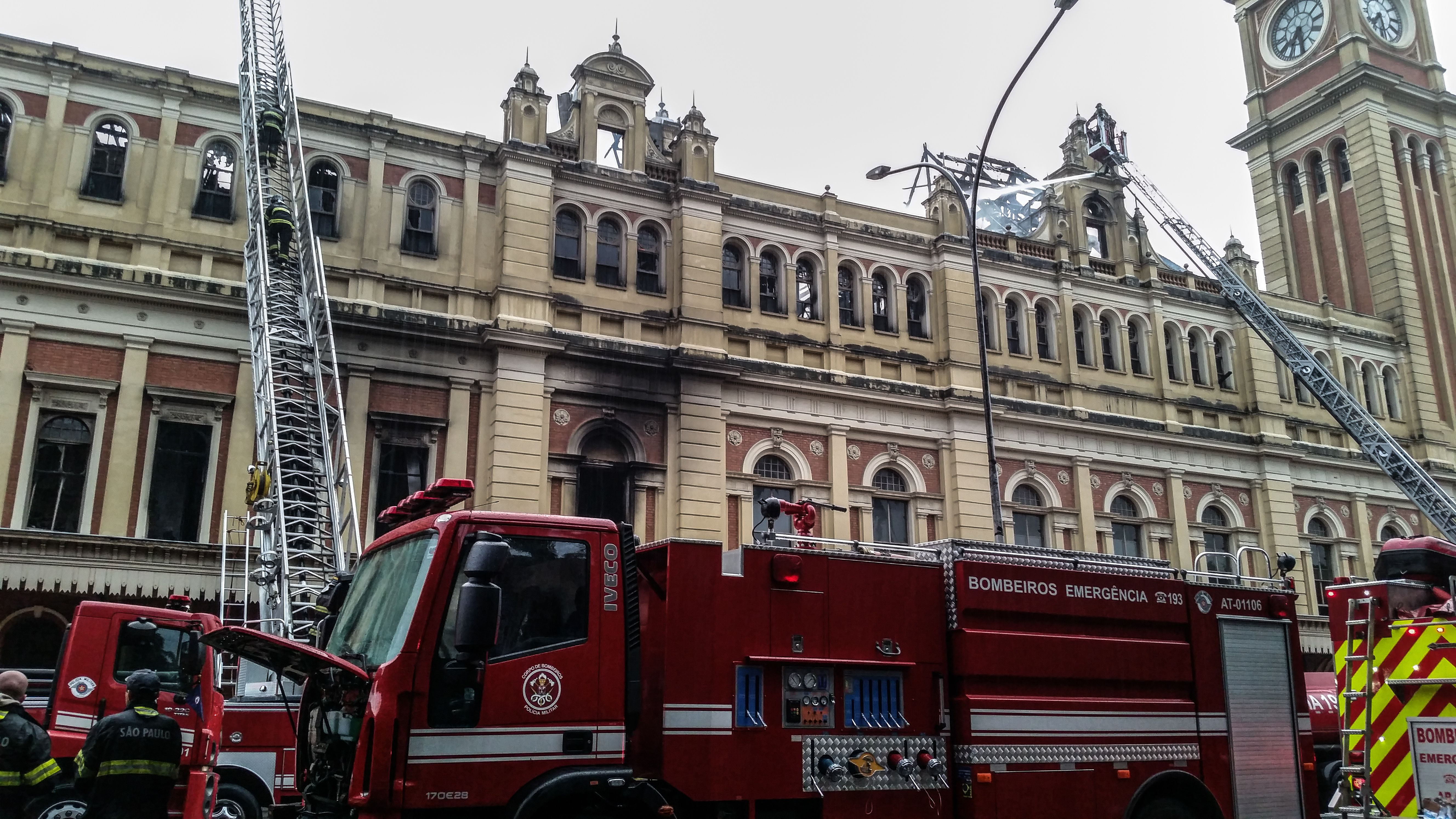 São Paulo - Bombeiros combatem incêndio de grandes proporções no Museu da Língua Portuguesa